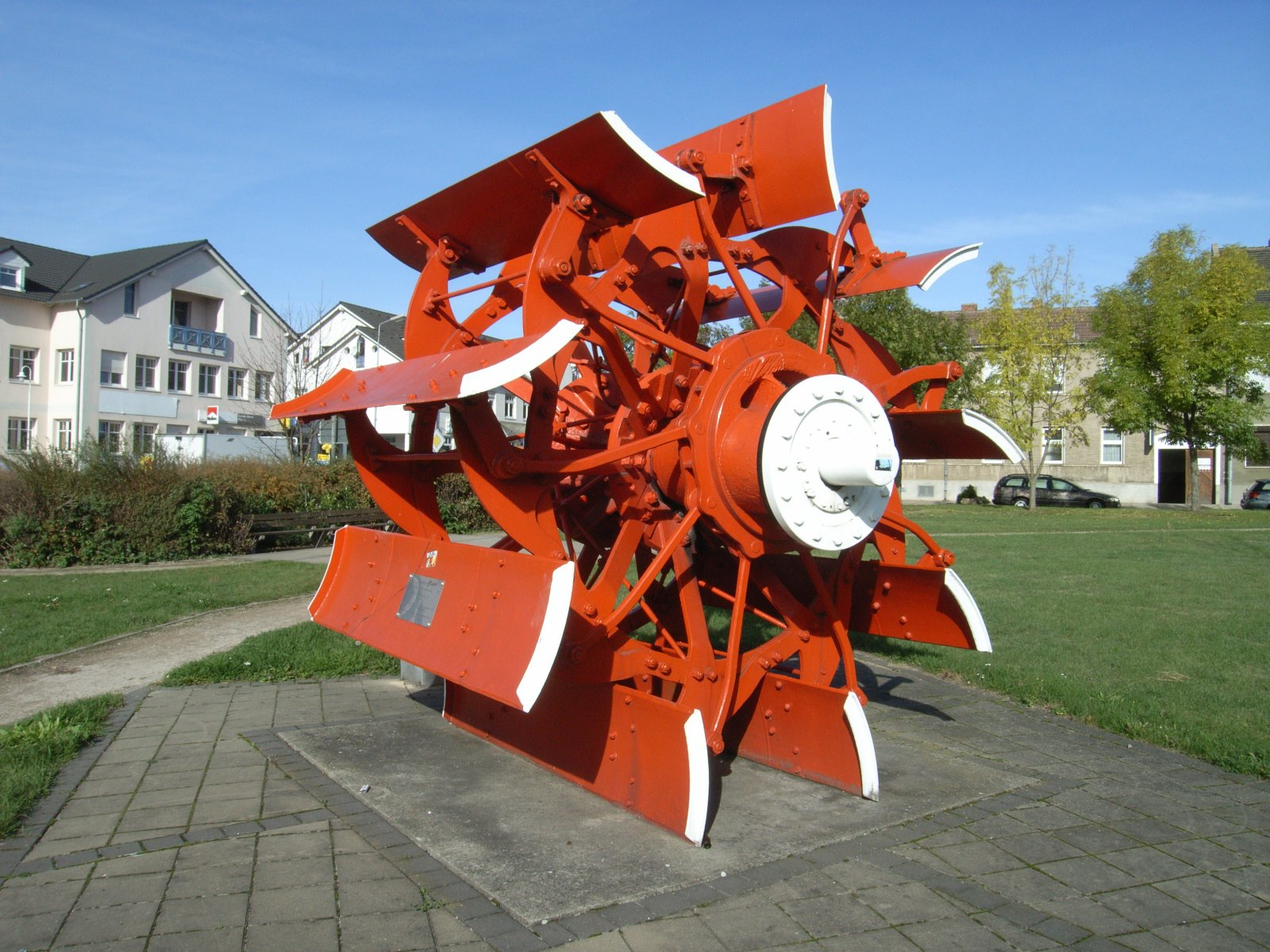 Roßlau, Exzenterschaufelrad auf dem Luchplatz (Text auf der Informationstafel: Gebaut nach dem Prinzip des Schiffsingenieurs Enst Wilhelm Dietze (1837-1915) 1961-1993 in einem auf der Roßlauer Werft erbauten Fahrgastschiff für die Oberelbe im ständigen Einsatz. 1997 vom Roßlauer Schifferverein 1847 e. V. geborgen und 1998 als Denkmal aufgestellt.)